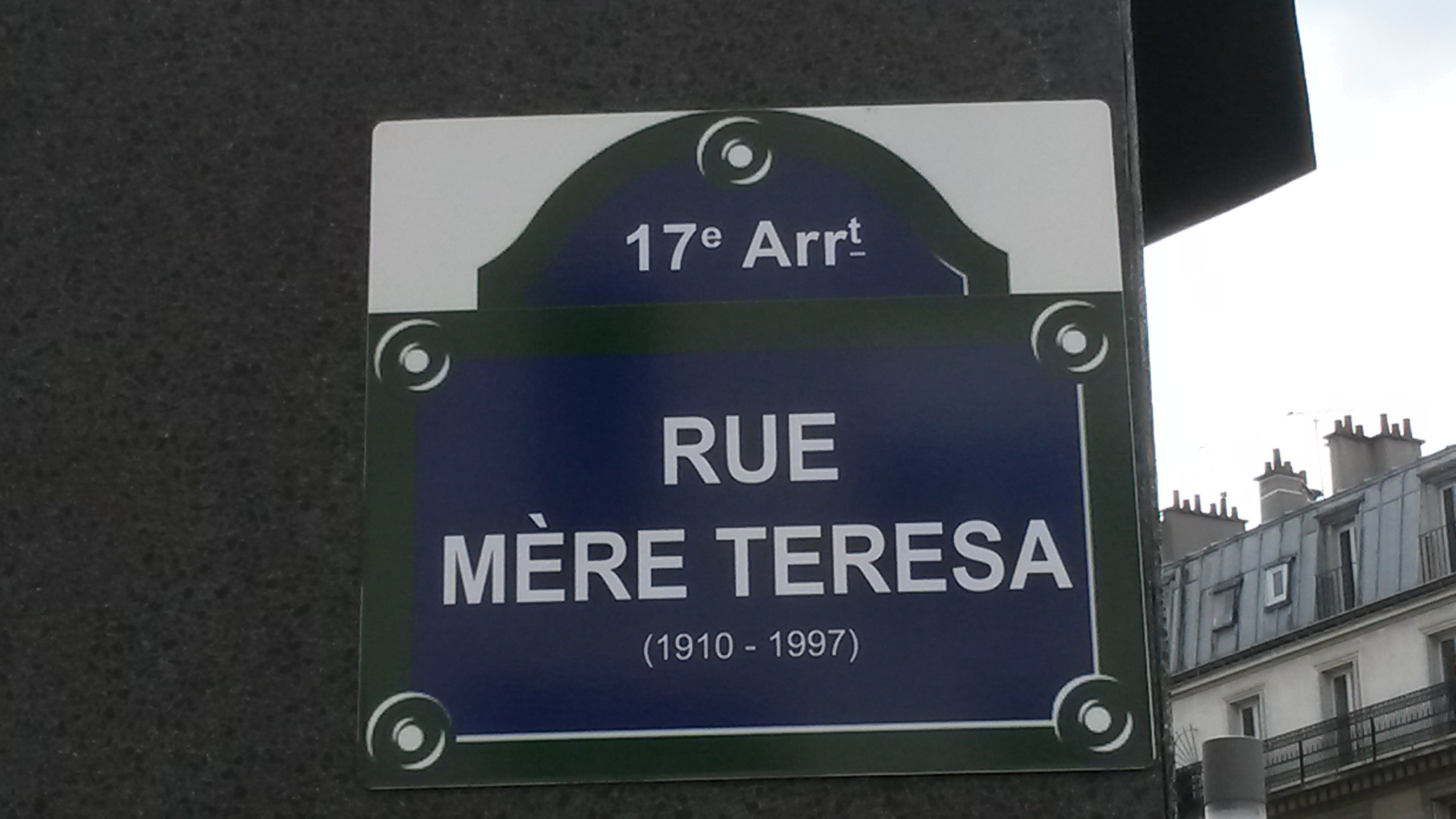 Paris - Rue Georges-Picquart